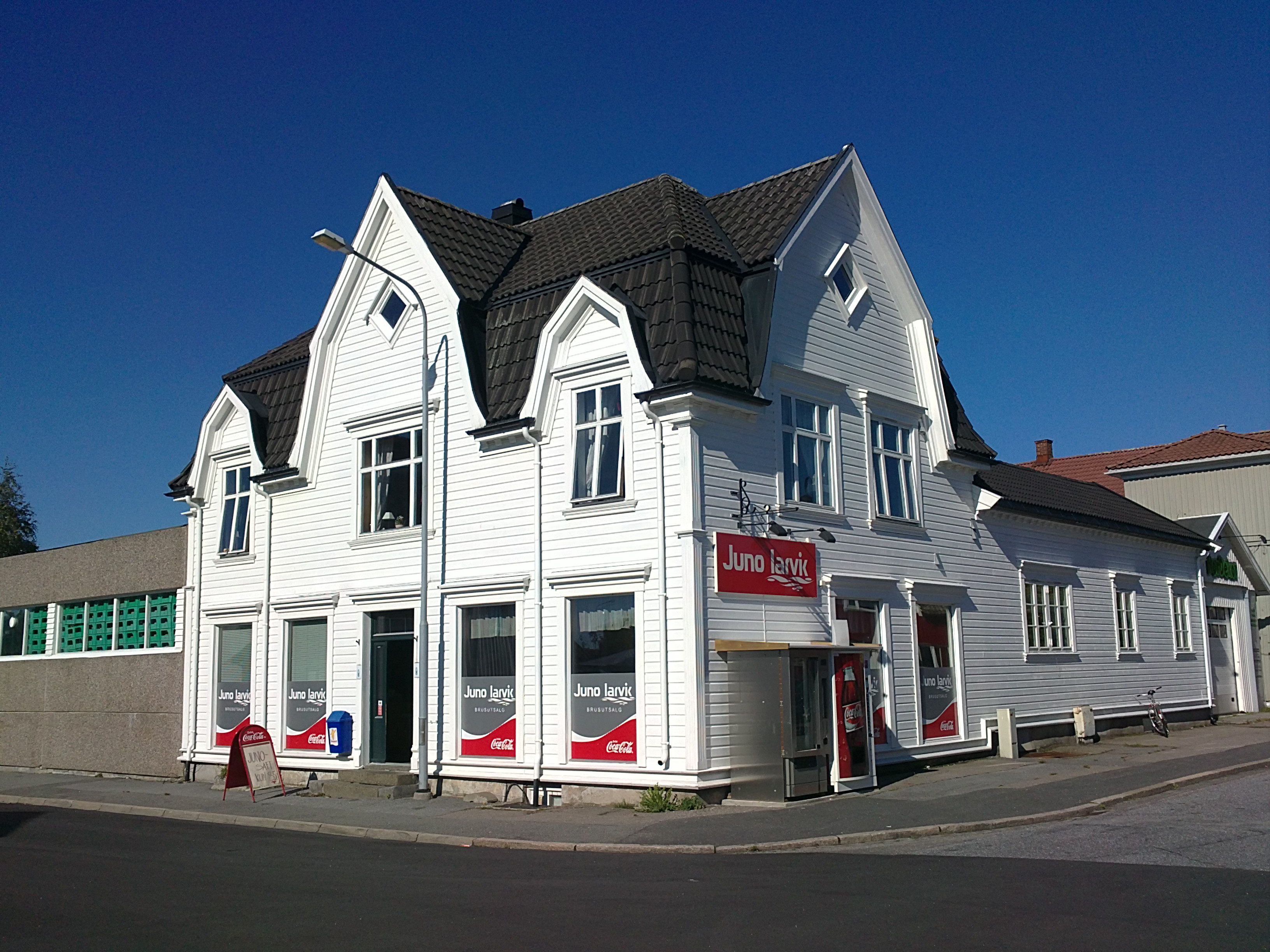 Bilde av Hans Sjølysts tidligere gård: Bugges gate 2